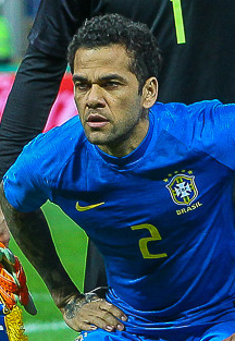 Россия проиграла Бразилии со счетом 0:3